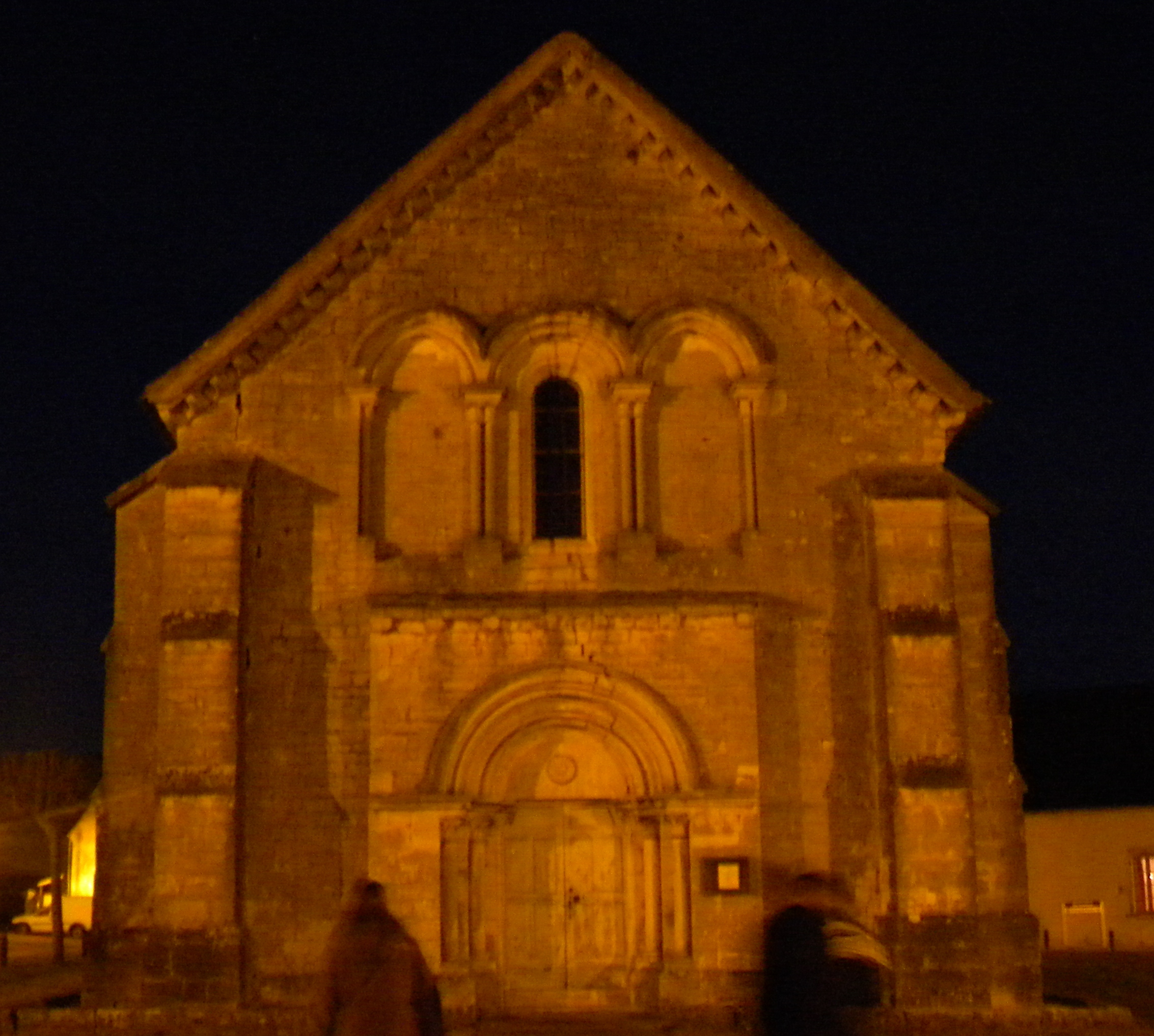 Agencourt